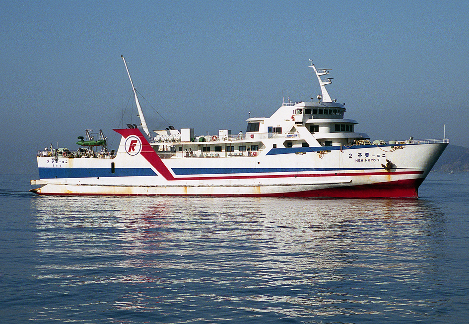 国道九四フェリー ニュー豊予2